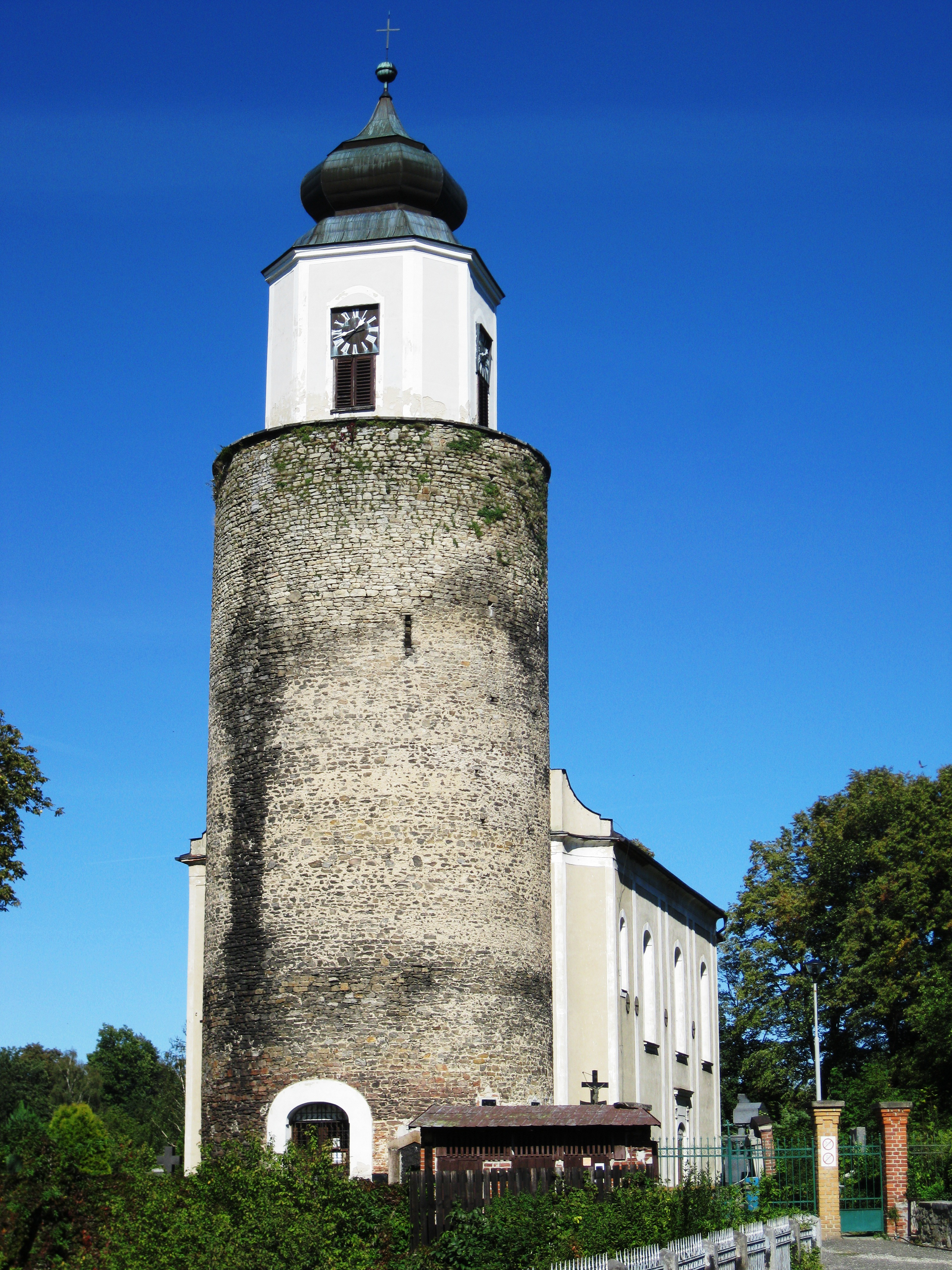 Kostel sv. Josefa (Žulová), Žulová